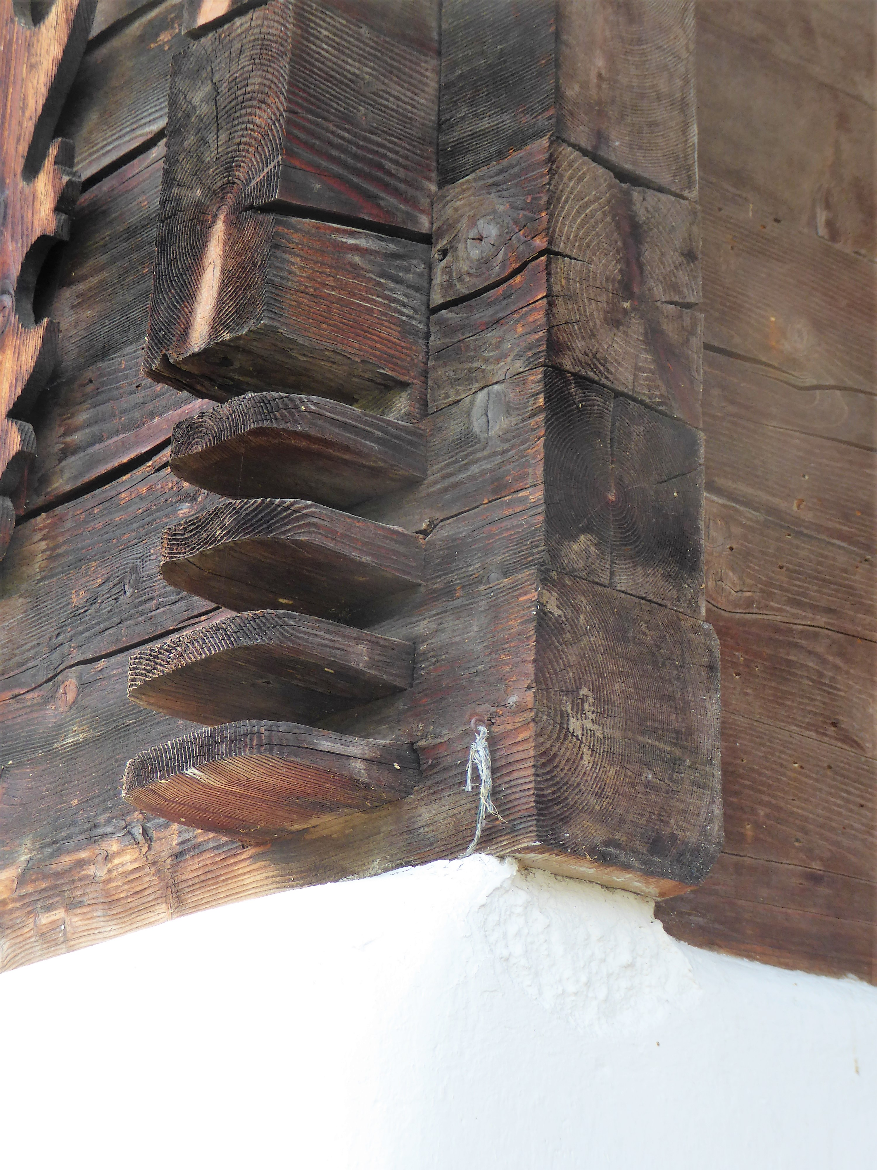 Schwellenkranz am Ackerhaus Ebnat-Kappel